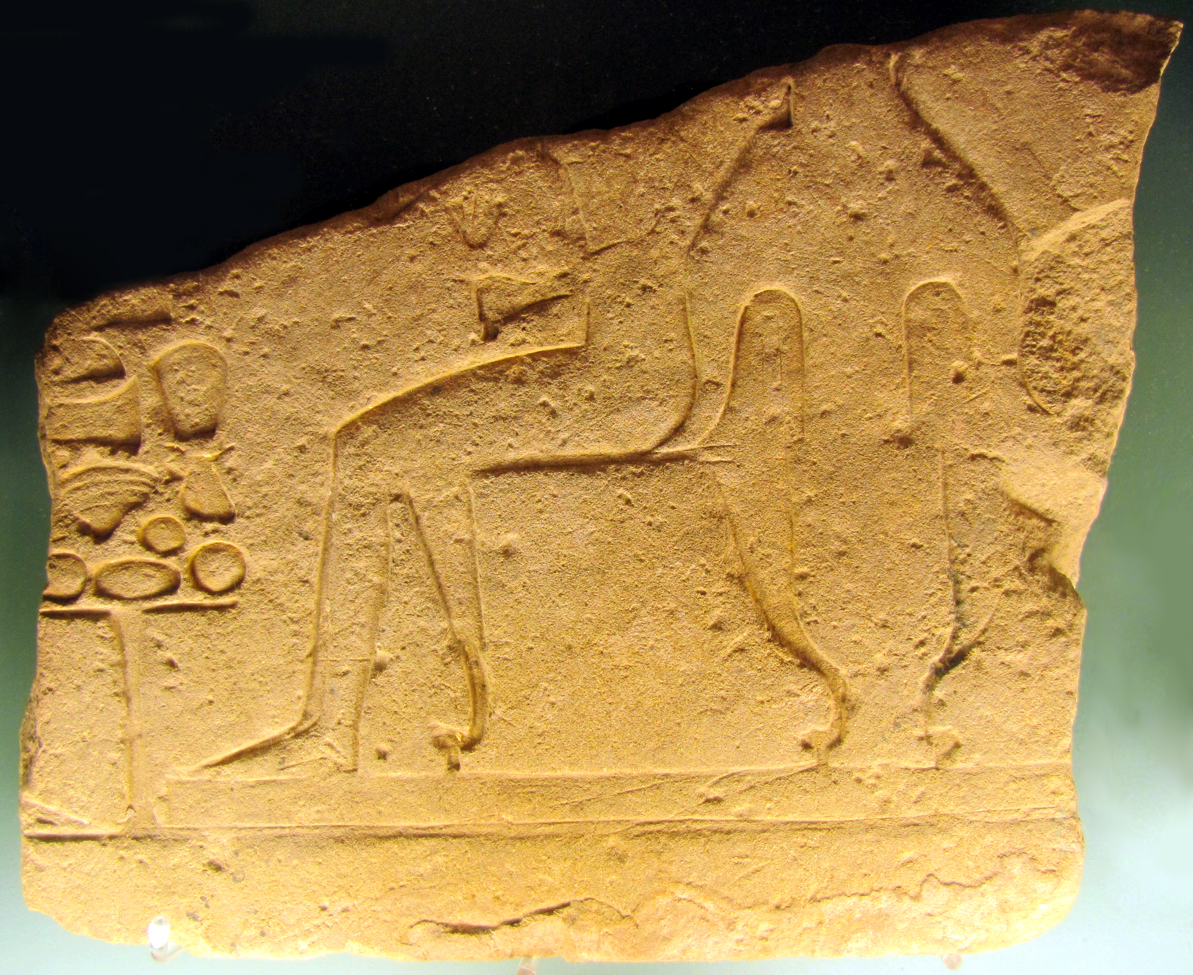 Fragmento de Estela de Dintel. Por la simetría de las figuras que representa este fragmento, el dintel habría tenido originariamente 1,20 cm por 0,52 cm. En los dinteles con este tipo de escenas se consigna la fórmula de ofrendas destinadas al Ka o fuerza vital de las personas representadas. Probablemente haya formado parte de la puerta de las viviendas levantadas al oeste del templo AKSHA.